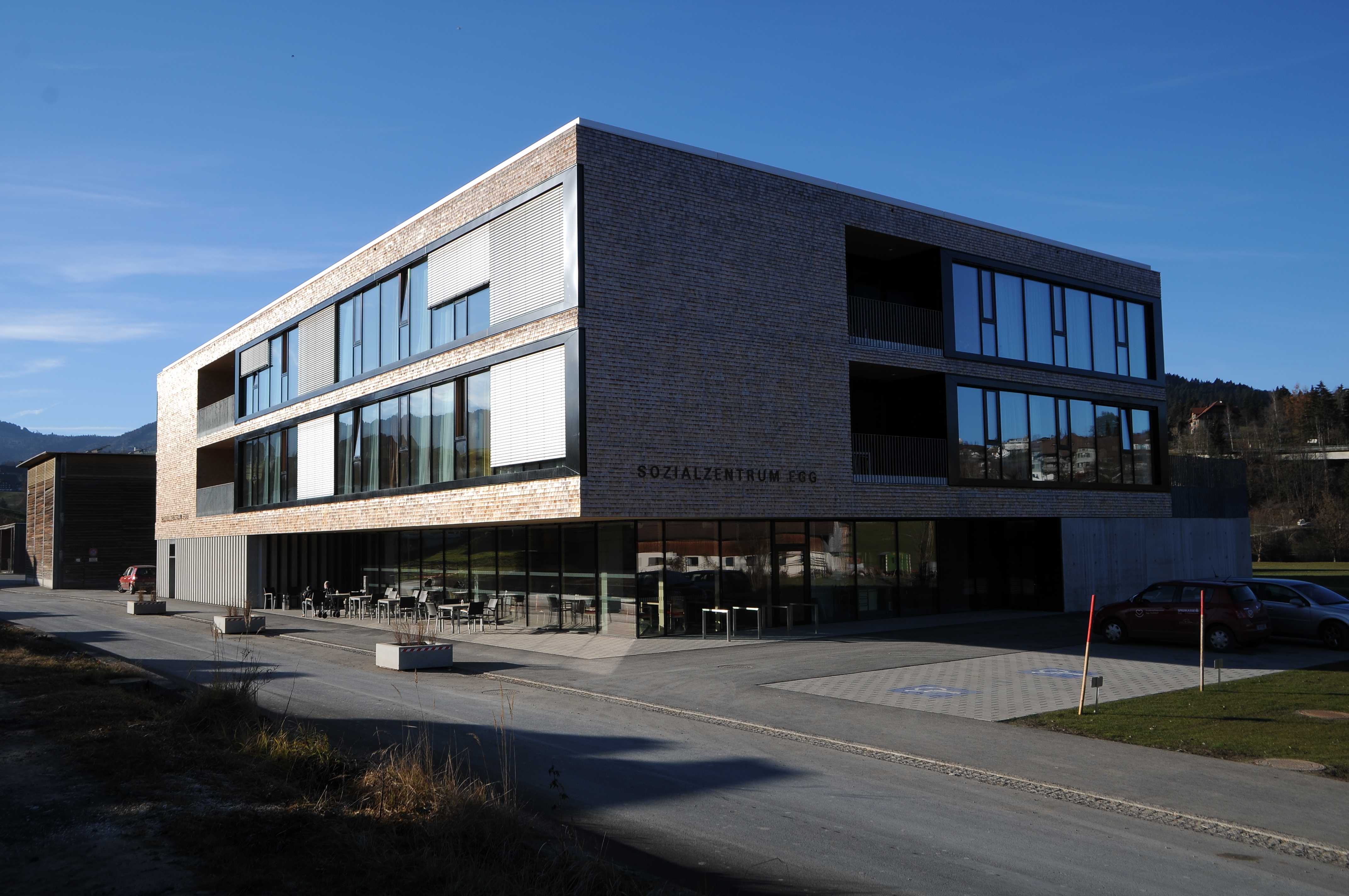 Anstelle des 2008 abgebrannten Vinzenzheim entstand hier das 2011 erbaute Sozialzentrum in Egg (Vorarlberg).